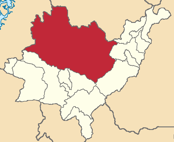 Mapa localizacor del cantón en Azuay, Ecuador